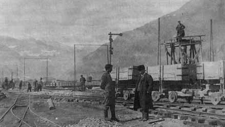 Simplon-Drehstrombetrieb: Leistungsbau in Brig